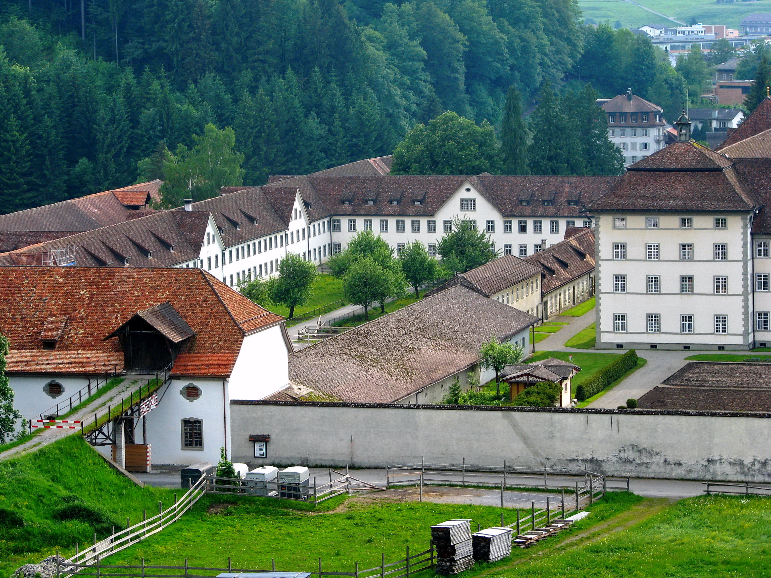 Benedictine Abbey in Einsiedeln (Switzerland)